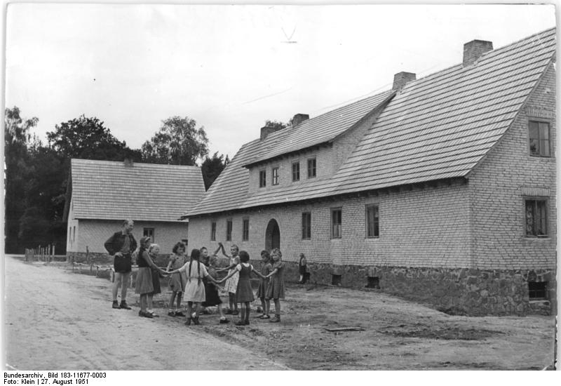 Freileben, Blick auf Dorfstraße Illus Klein 27.8.1951 Mustersiedlung Freileben-Sachsen-Anhalt. Das Dorf Freileben im Bezirk Sachsen-Anhalt wurde in gemeinschaftlicher Aufbauarbeit der Siedler und Neubauern errichtet. Die Grundsteinlegung erfolgte im Herbst 1946 in einem Waldgebiet, das durch Kriegseinwirkungen ausgedörrt und verbrannt war. Ein Jahr später, im Herbst 1947, stand das erste Haus. Da kein in der Umgebung liegender Betrieb geschnittenes Holz für den weiteren Aufbau liefern konnte, wurde zunächst ein eigenes Sägewerk geschaffen. Die für das Sägewerk notwendigen Maschinen wurden teilweise aus altem Material zusammengebaut. Heute gehören bereits eine Gärtnerei, Tischlerei, Schlosserei, Schuhmacherei, in Landambulatorium und eine Schule zum Dorf. FdJler und Junge Pioniere haben sich aktiv am Aufbau beteiligt. UBz: Wo früher verbrannter Wald die Erde bedeckte, sind jetzt schöne Strassen entstanden. Eine frohe Jugend wächst hier heran.